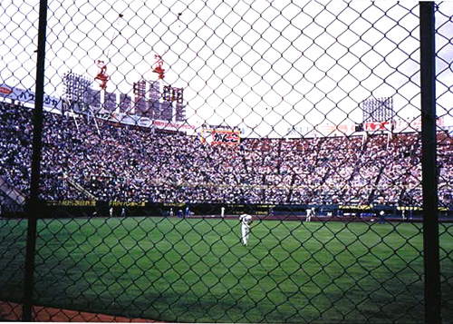 大阪球場ライト側スタンドから撮影（1988年）